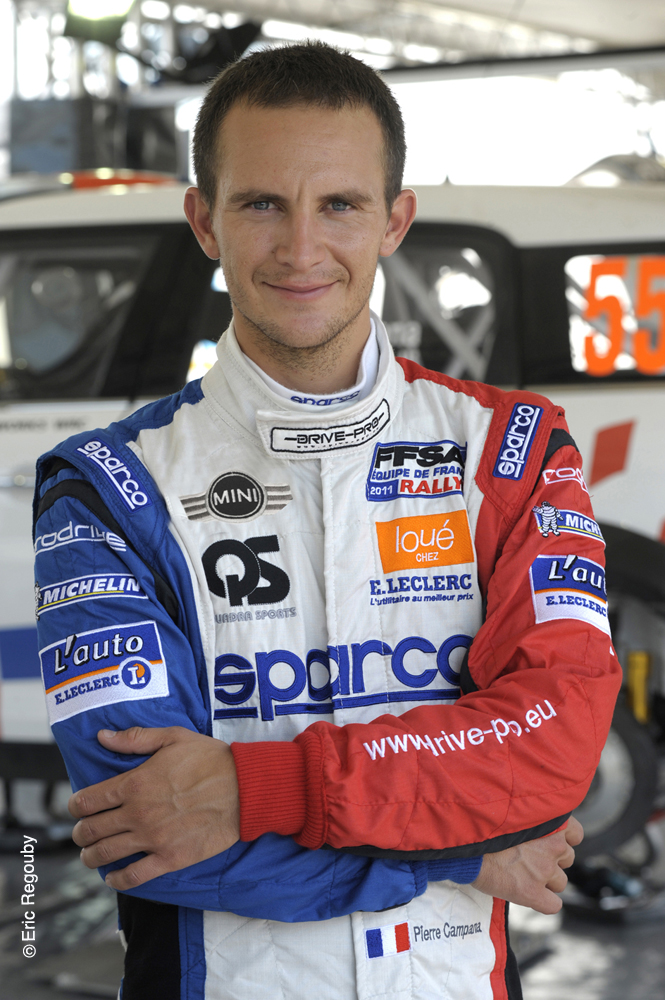 Pierre Campana